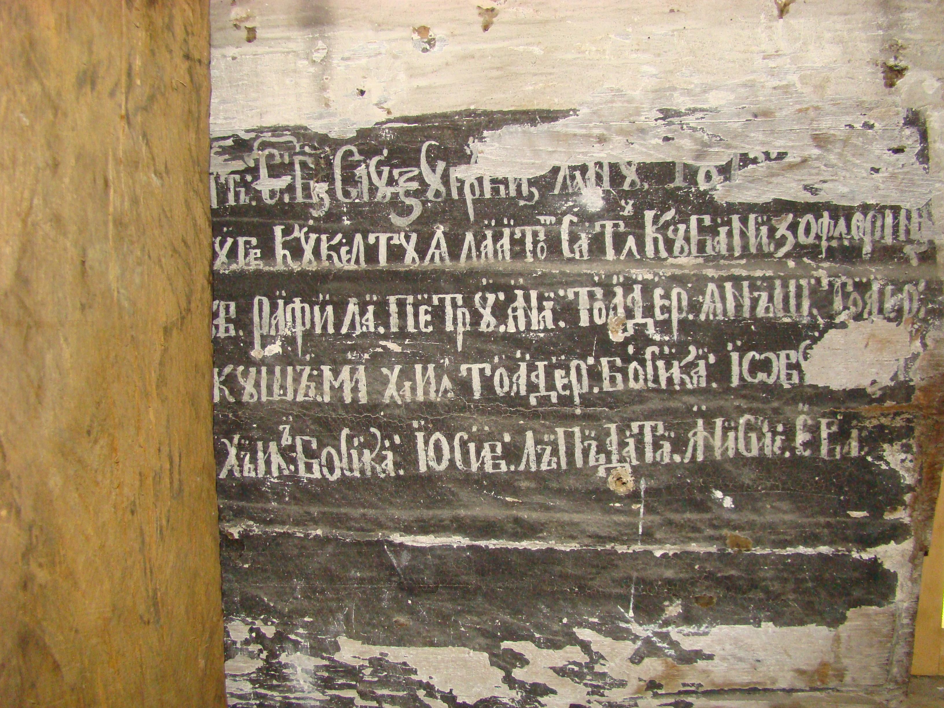 Biserica de lemn din Troaș